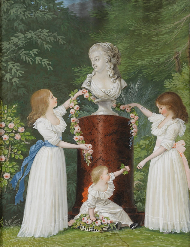 Büste der achtundvierzigsten Frau Gräfin Reuss, nebst deren drey Comtessen, Cecilie, Clementine und Adelheid, Köstritz den 6 ten October 1795 Kinder von von Graf Heinrich XLVIII. von Reuß (1759–1825) und Gräfin Christine Henriette Antonie von Schönburg-Wechselburg-Forderglauchau (1766–1833): Cäcilie (* 1788), Clementine (* 1789), Adelheid (* 1794)